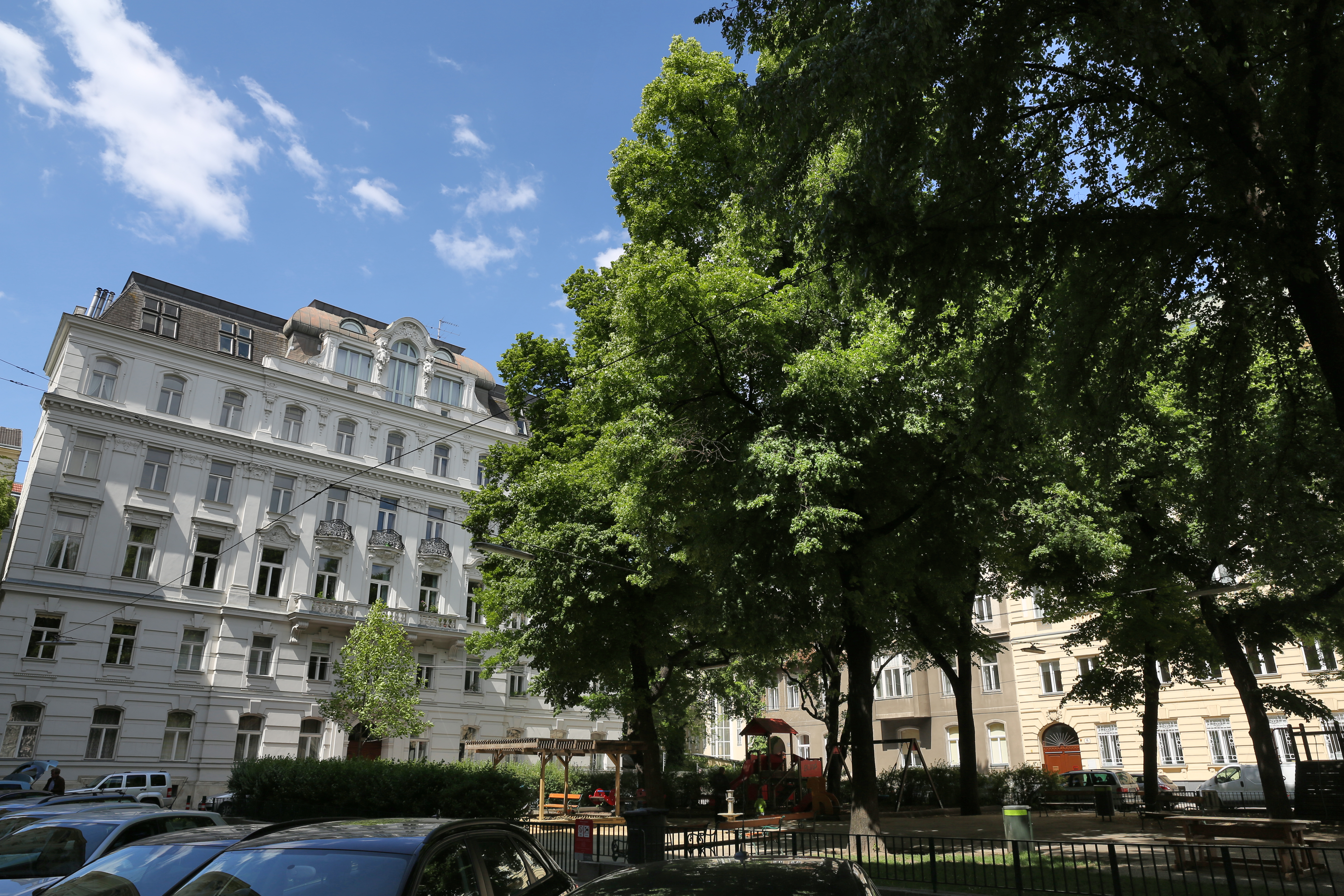 Brahmsplatz mit Spielplatz in Wien Wieden